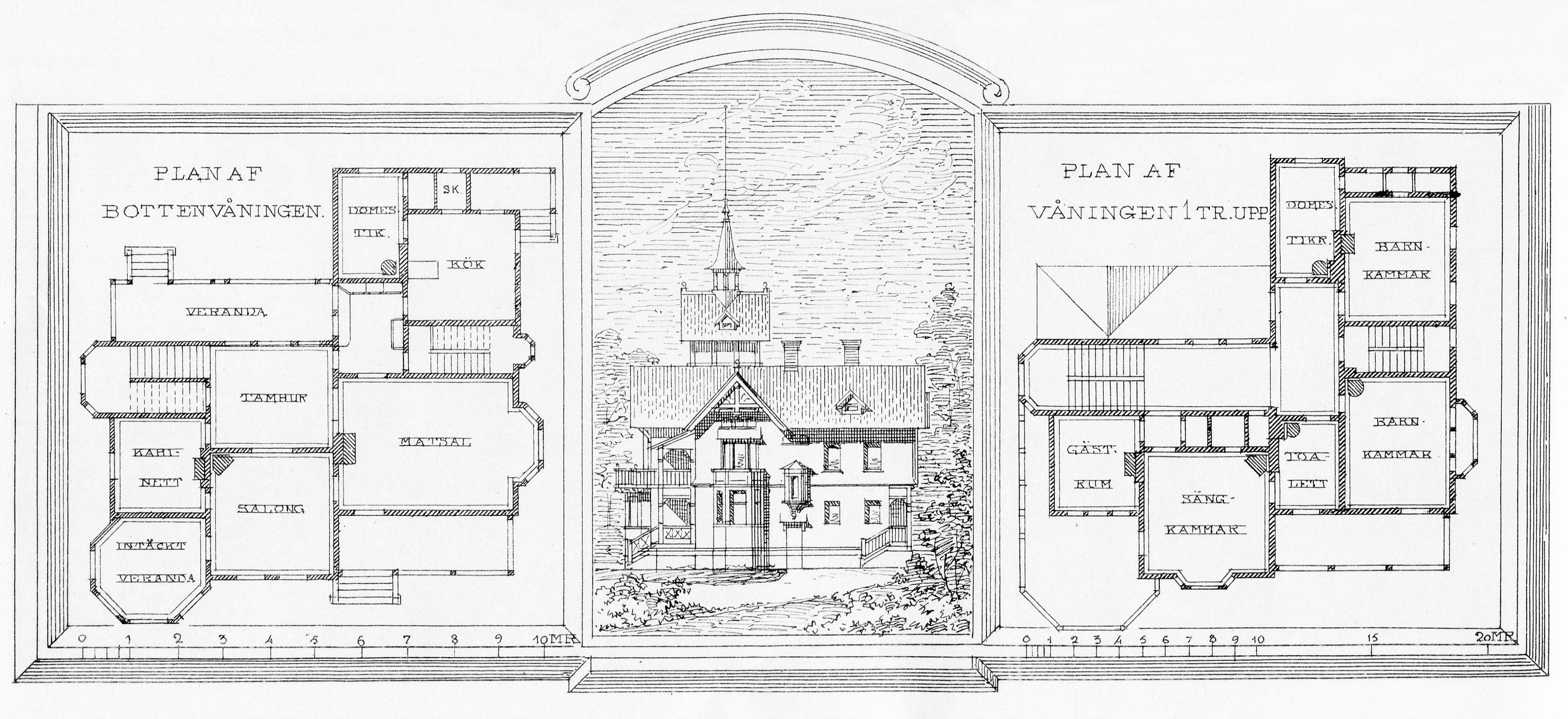 Ackevillan, Saltsjöbaden, ritning